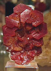 Fotografía de Pablo Alberto Salguero Quiles